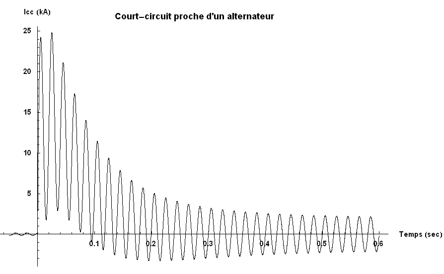 Courant de court-circuit d'un défaut proche d'un alternateur